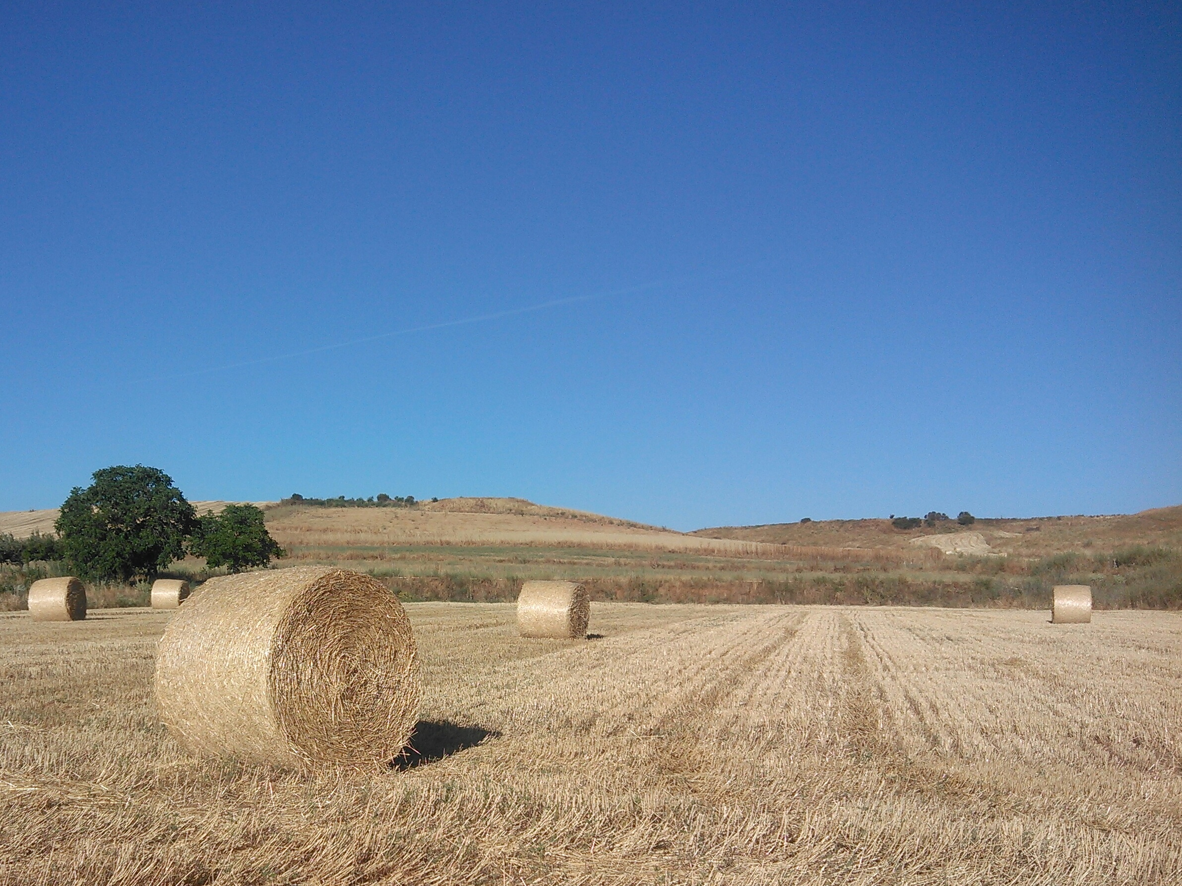 Paisaje acolinado en el término municipal de Villademor de la Vega, España.